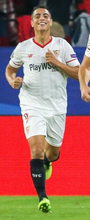 Clément Lenglet, Wissam Ben Yedder, Pablo Sarabia, Gabriel Mercado